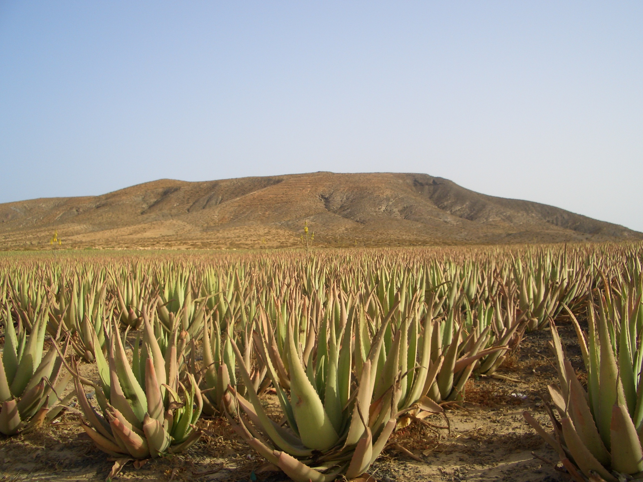 Zuchtanlage auf Furteventura für Aloe Vera